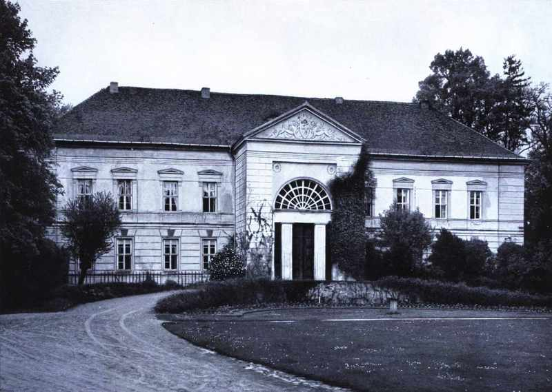 Schloß Buckow (Märkische Schweiz), erbaut um 1700, mit Schinkel-Fassade von 1802